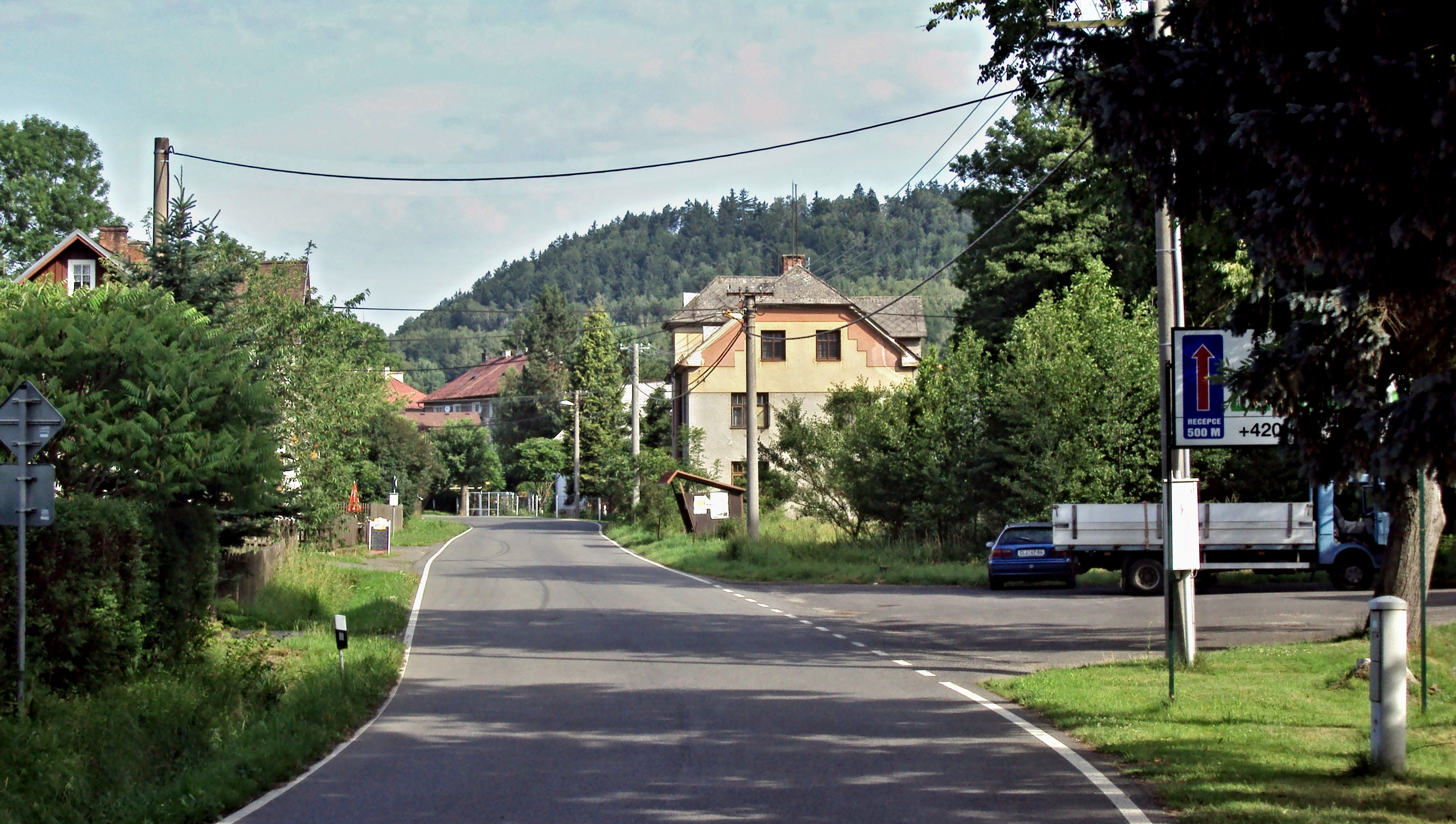 Obec Heřmanice v jižní části